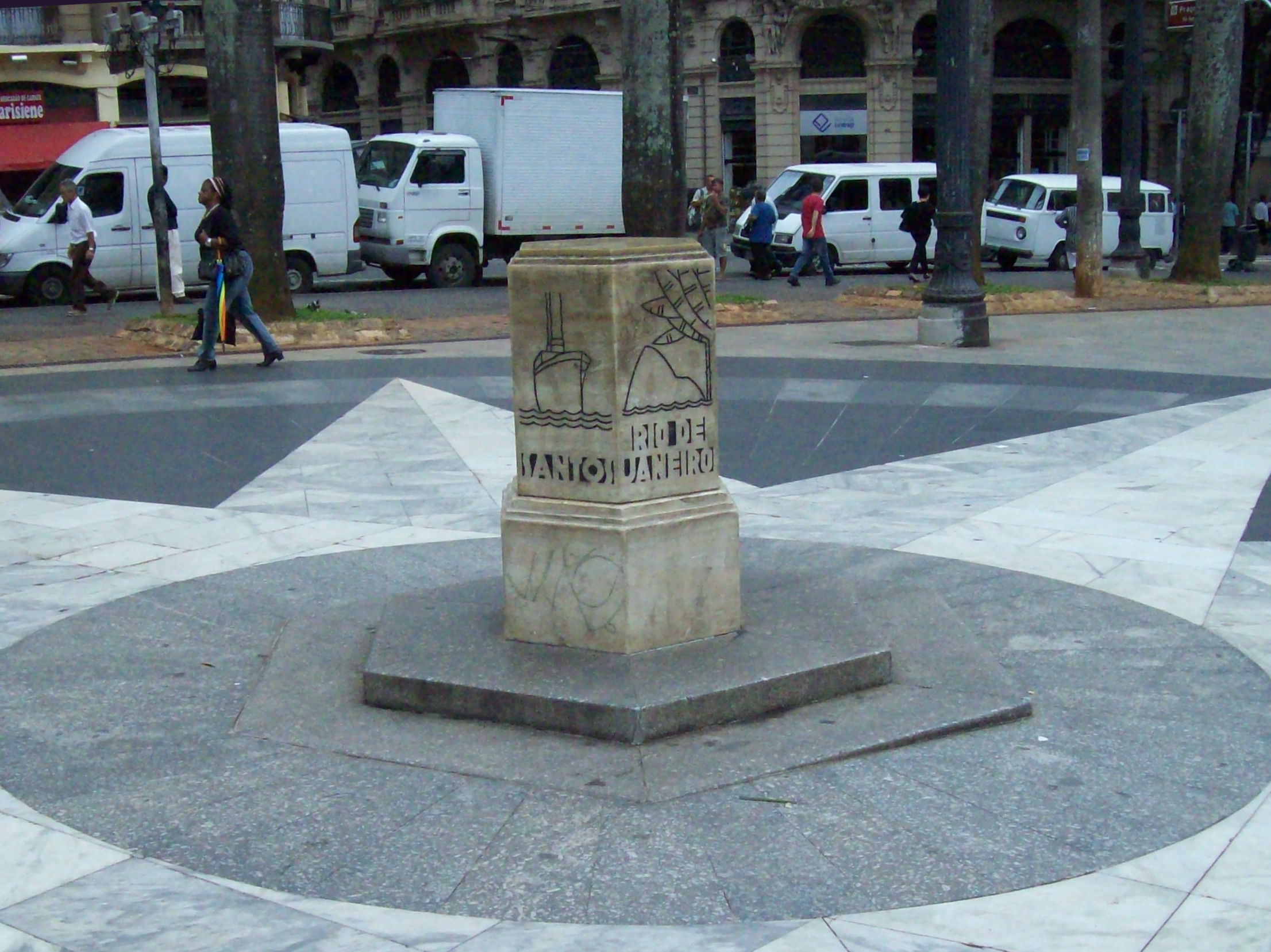 Marco zero da cidade de São Paulo, localizada na região central.